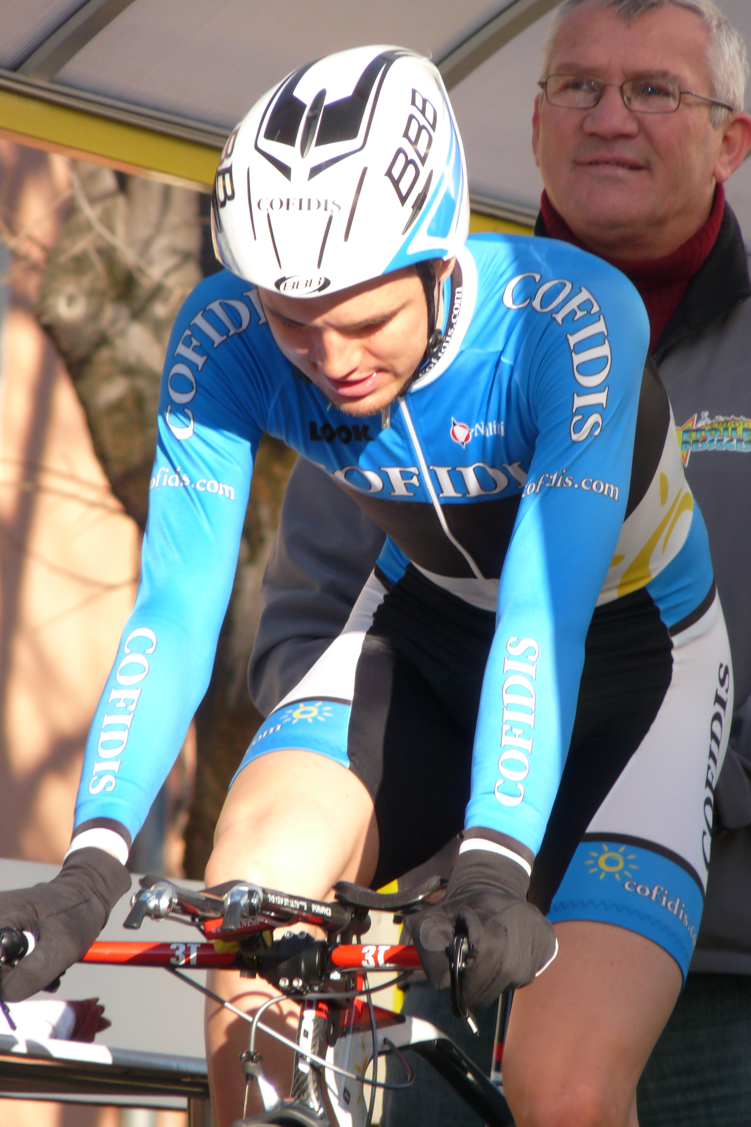 Rein Taaramäe au départ du contre la montre, dernière étape de l'Étoile de Bessèges 2012